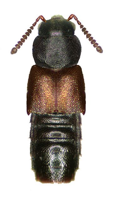 Silusa densa